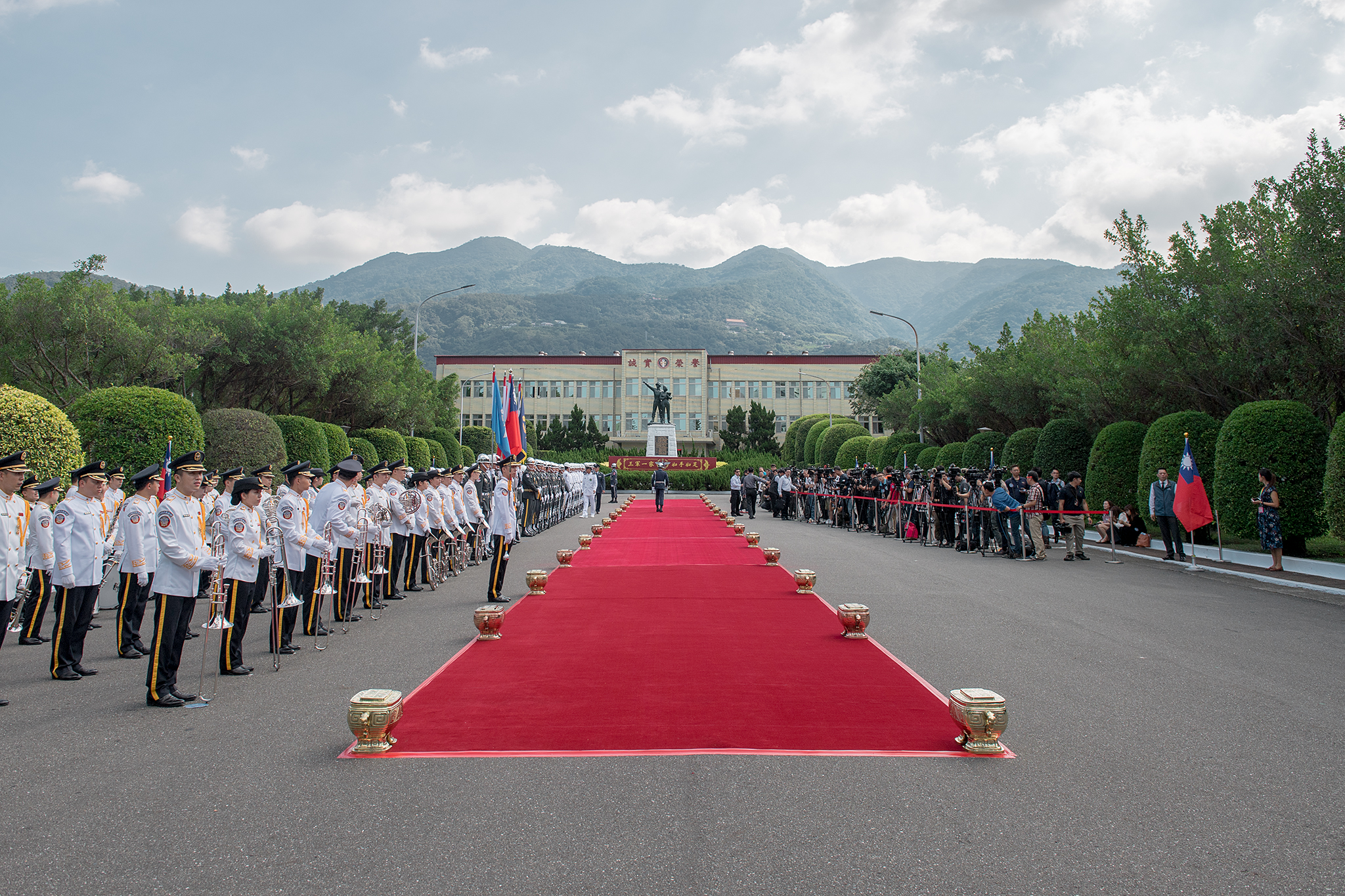 中華民國107年三軍六校院聯合畢業典禮暨聯合餐會，國防大學政治作戰學院（復興崗校區）紅地毯。